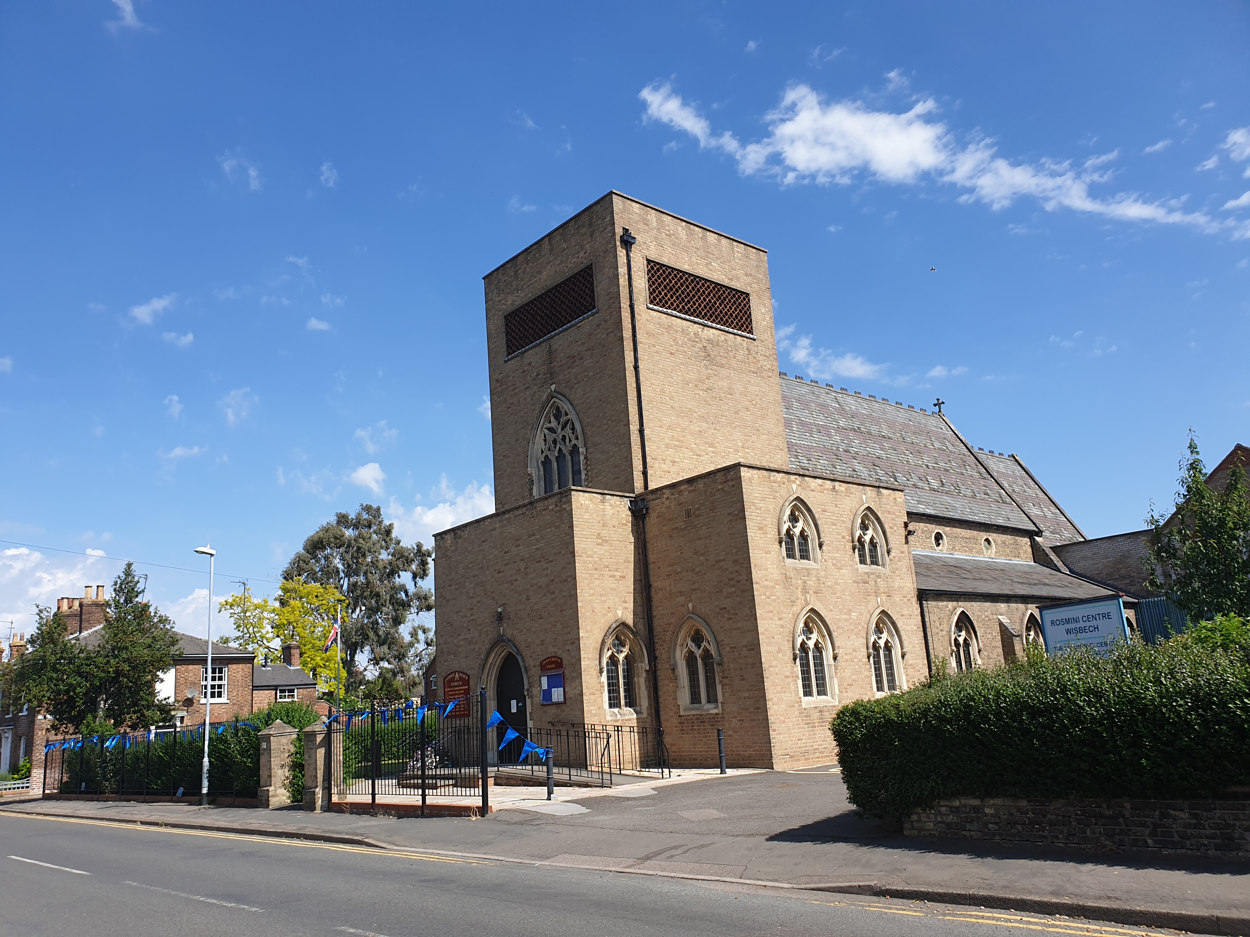 Visbičo Mergelės ir Šv. Čiarlzo Boromeo bažnyčia